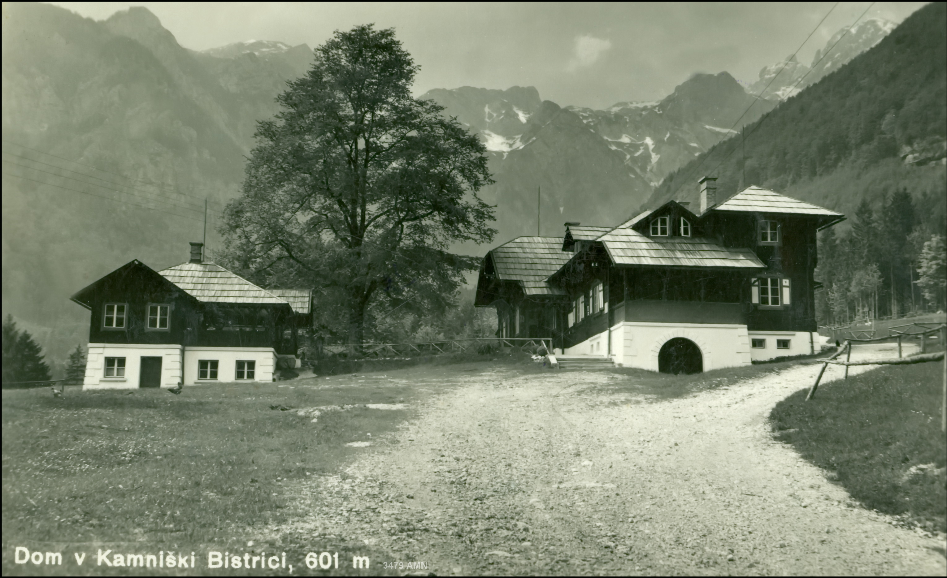 Razglednica Doma v Kamniški Bistrici.